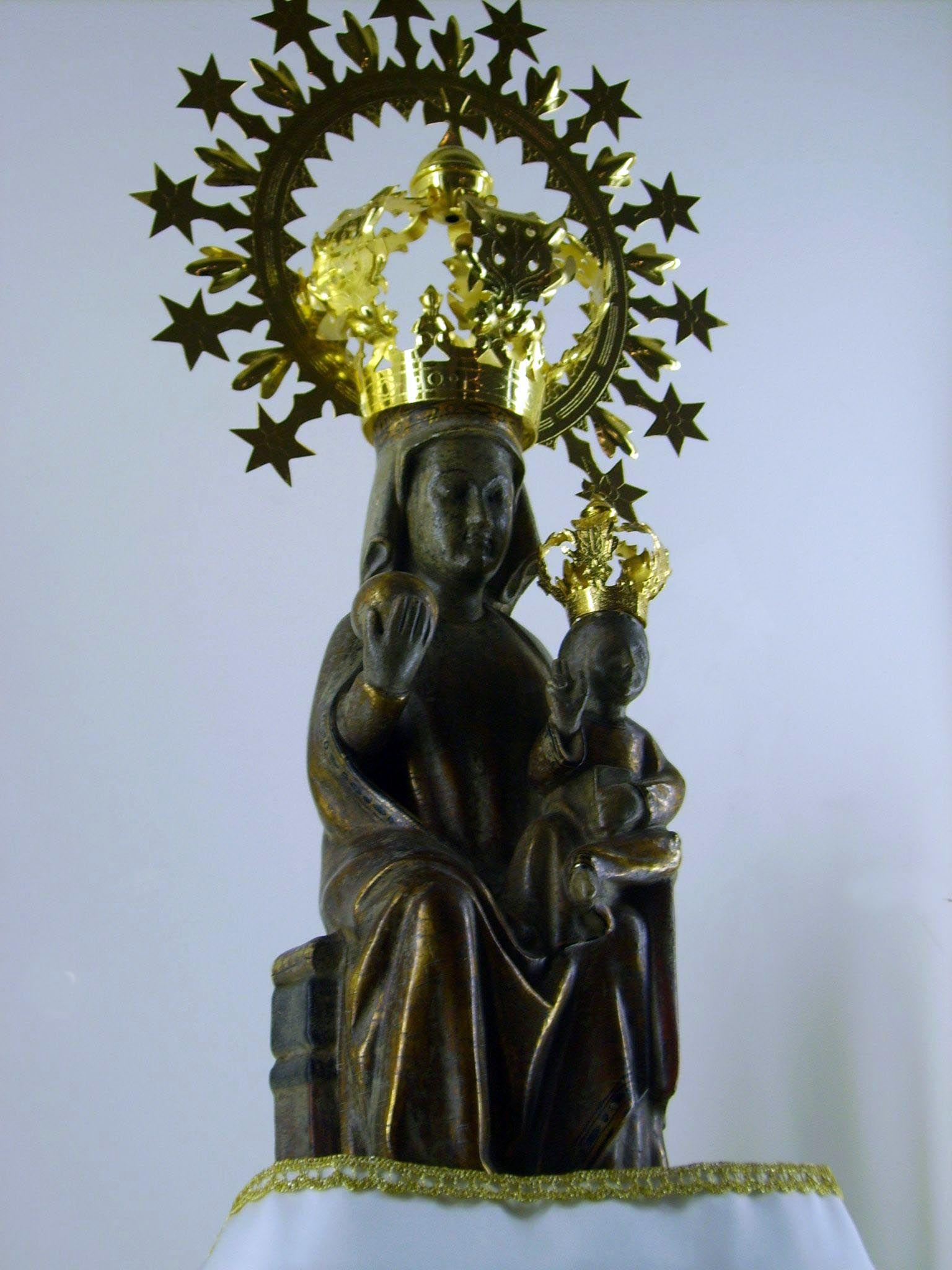 Santuari de Nostra Senyora de la Cisa (Premià de Dalt)